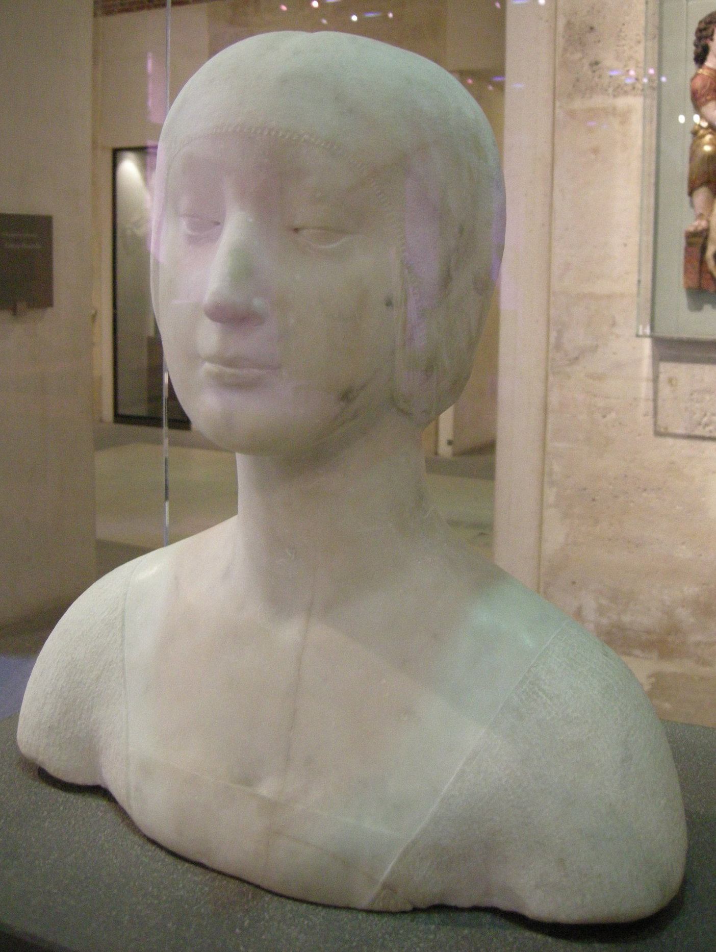 Francesco laurana, principessa 02.JPG